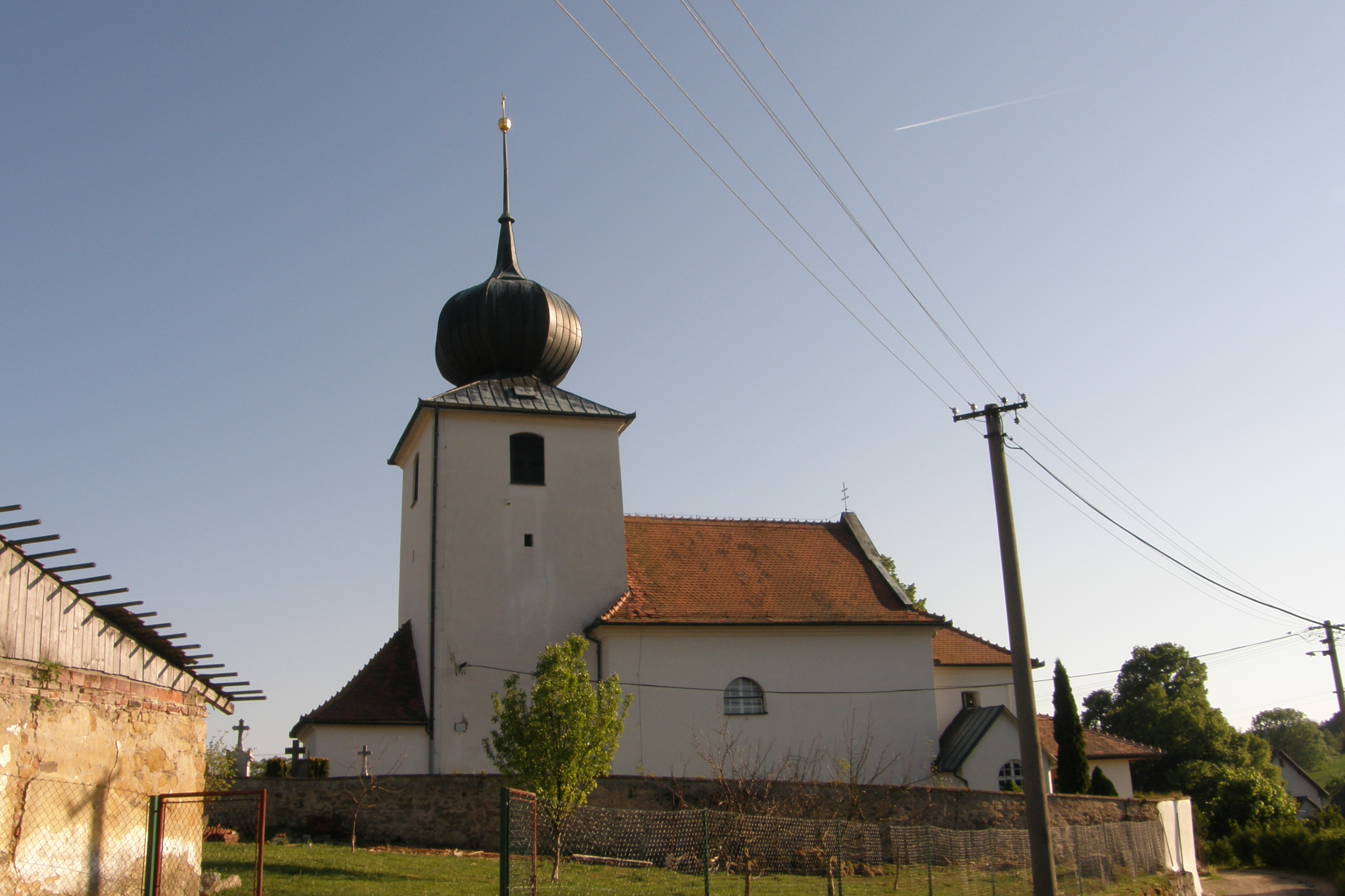 Kostel sv. Maří Magdalény (Sulíkov), Sulíkov